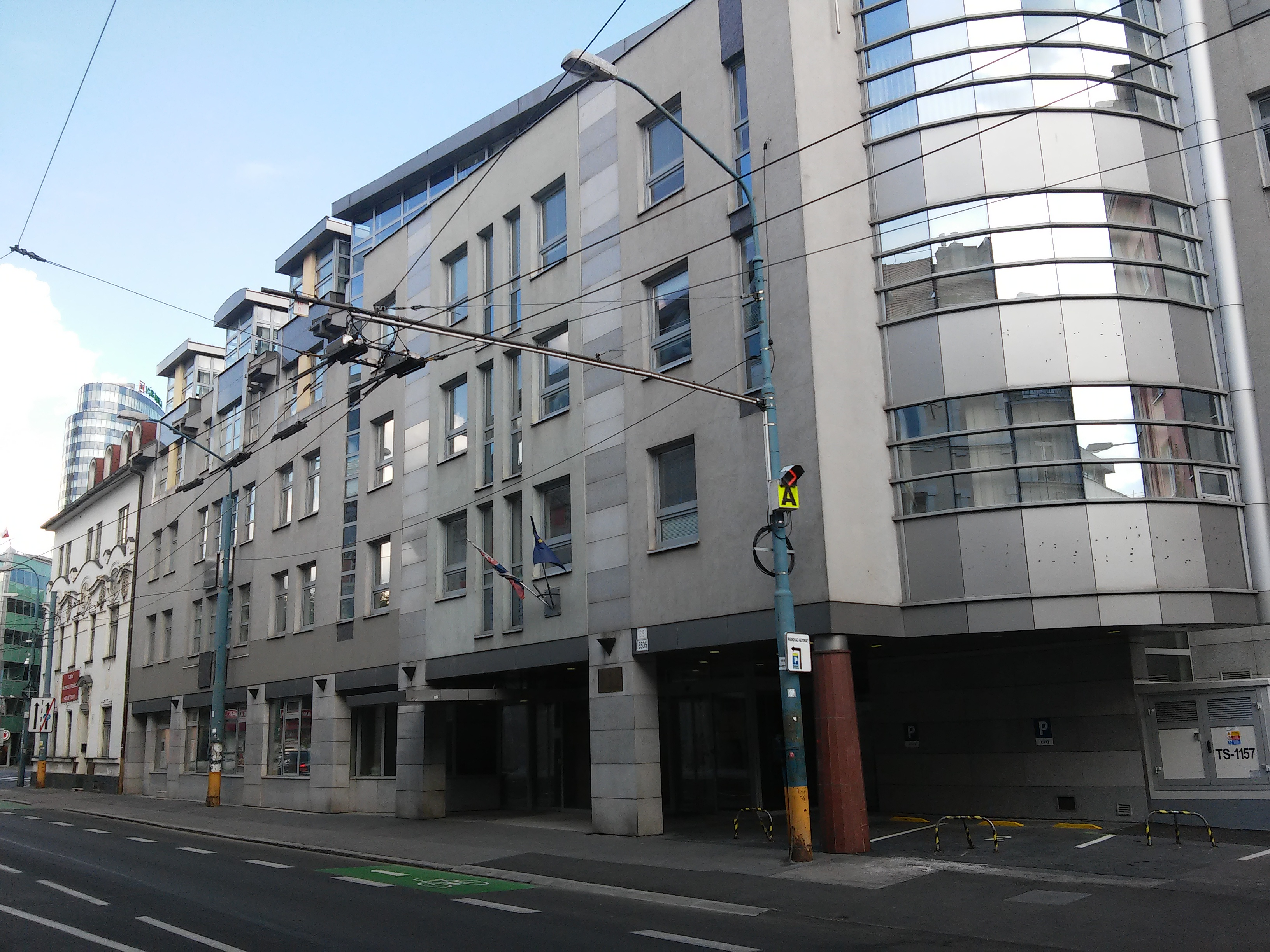 Úrad pre verejné obstarávanie, Dunajská 68, Staré Mesto, Bratislava